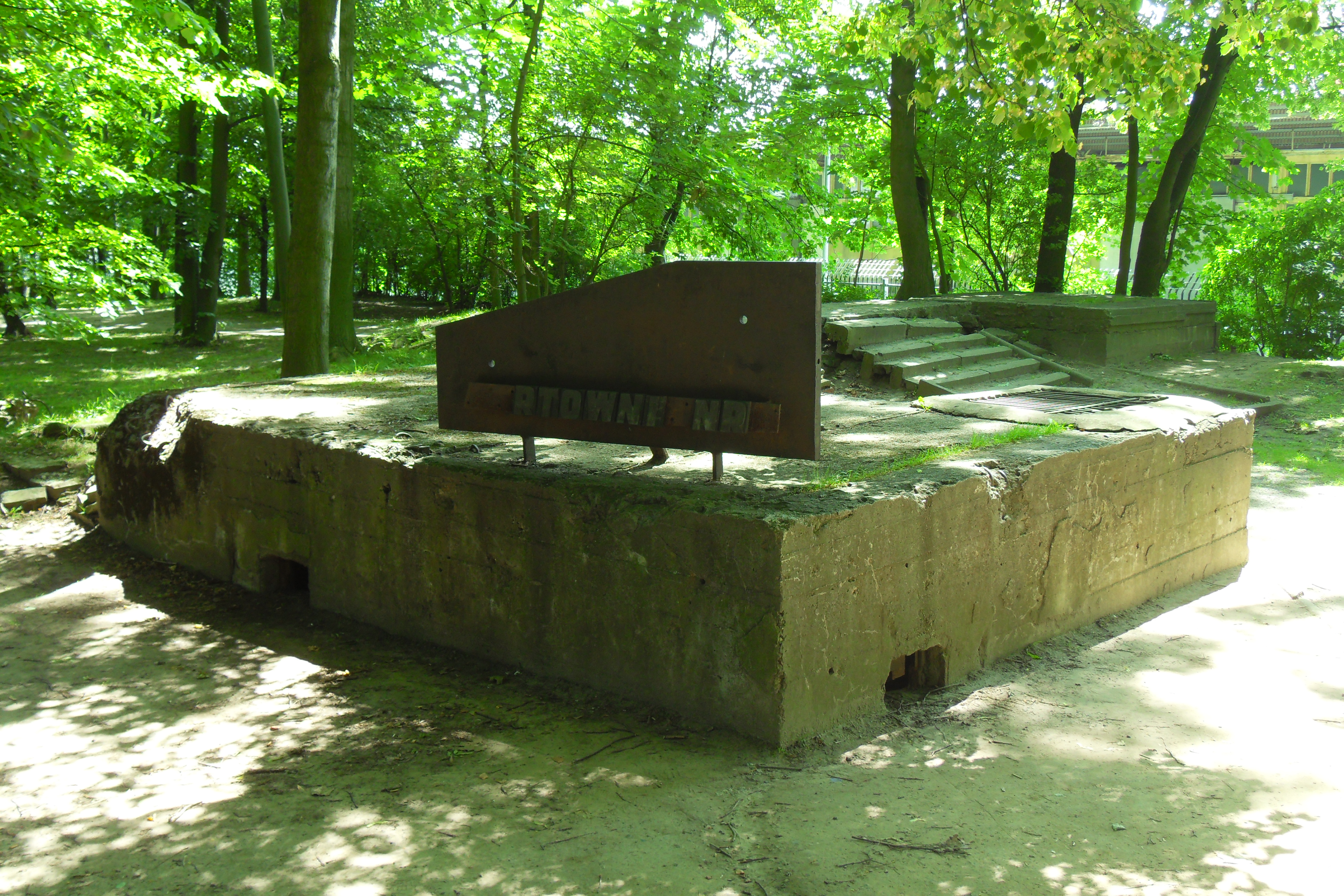 Gdańsk Westerplatte, wartownia nr 3 Wojskowej Składnicy Tranzytowej (WST).